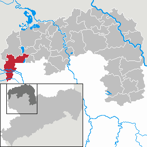 Schkeuditz in Saxony - Landkreis Nordsachsen